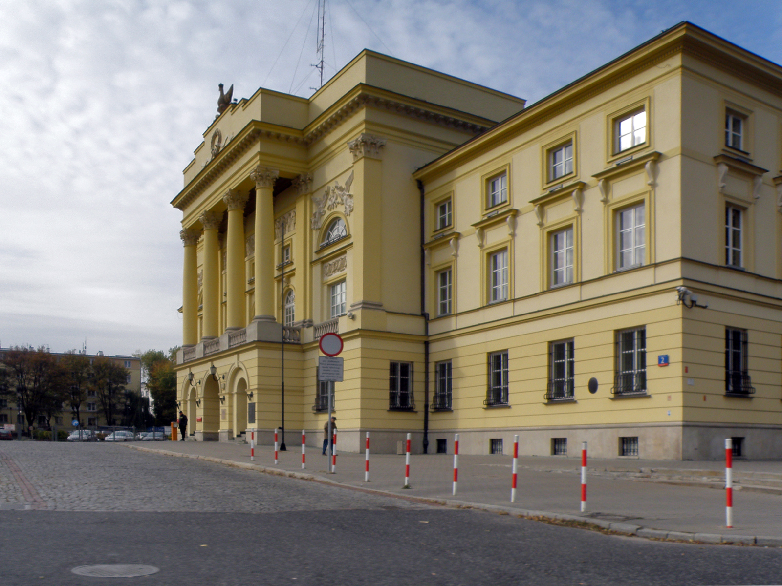 Pałac Mostowskich w Warszawie, ul. Nowolipie 2